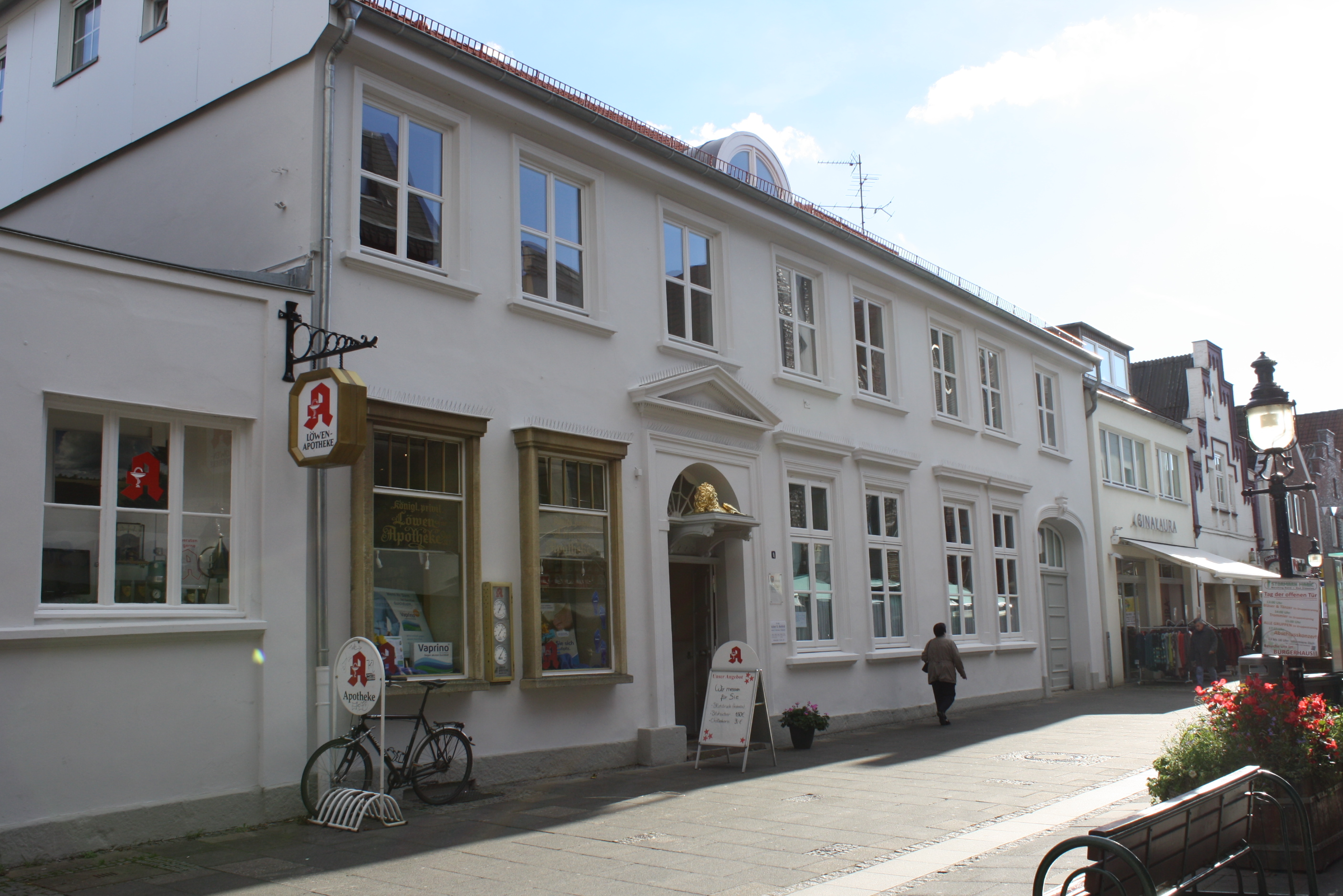 Löwenapotheke